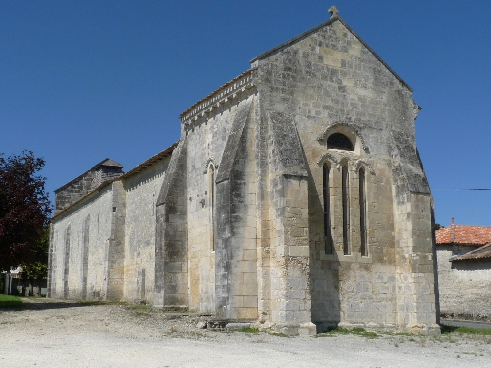 Eglise de Neulles, Charente-Maritime, France